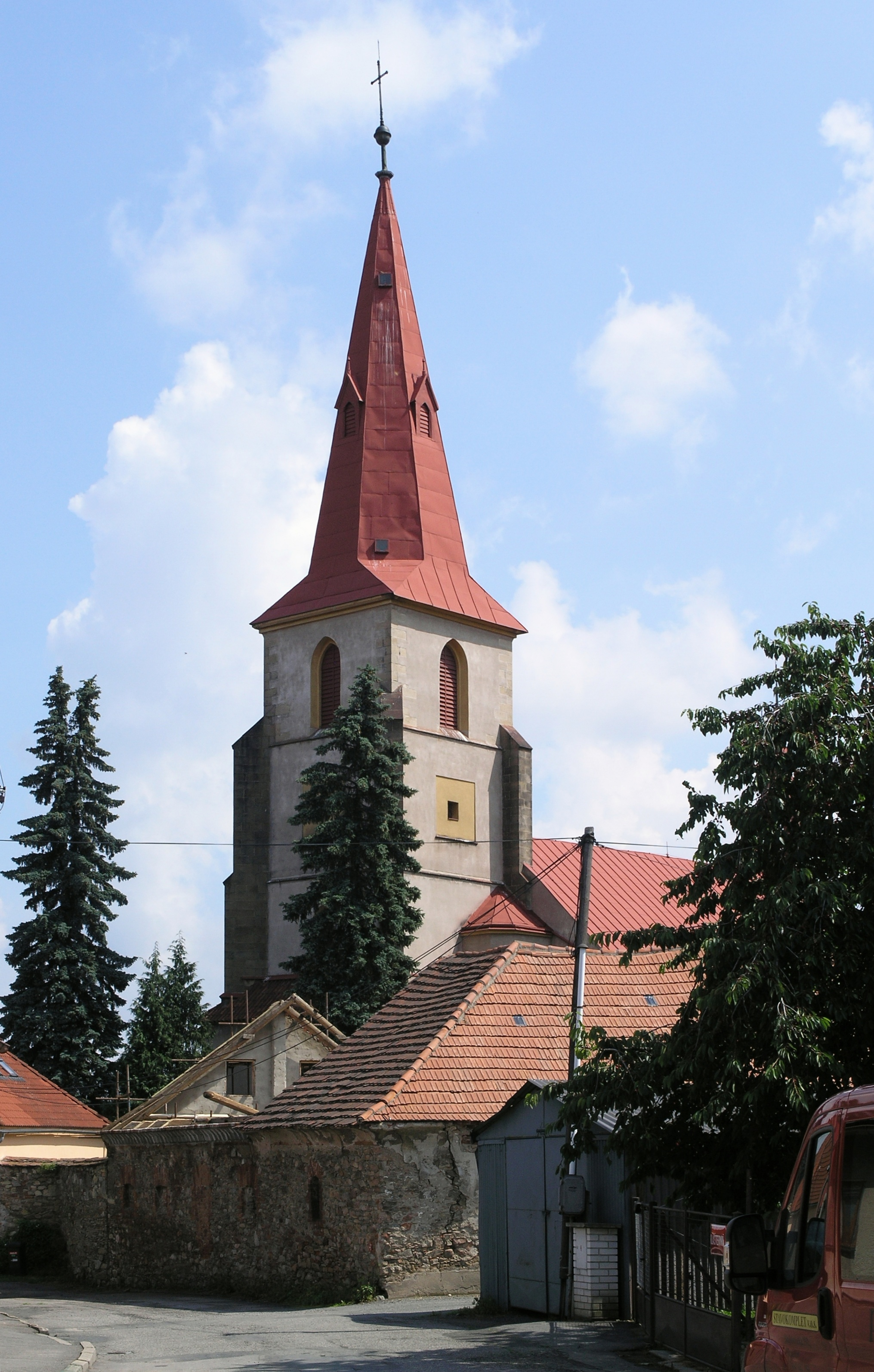 Chotěboř - Klášterní ulice